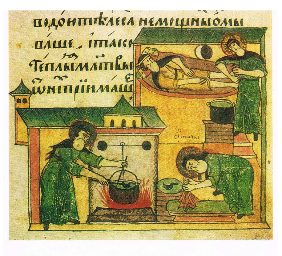 Миниатюра из рукописи 1648 года «Житие Антония Сийского»